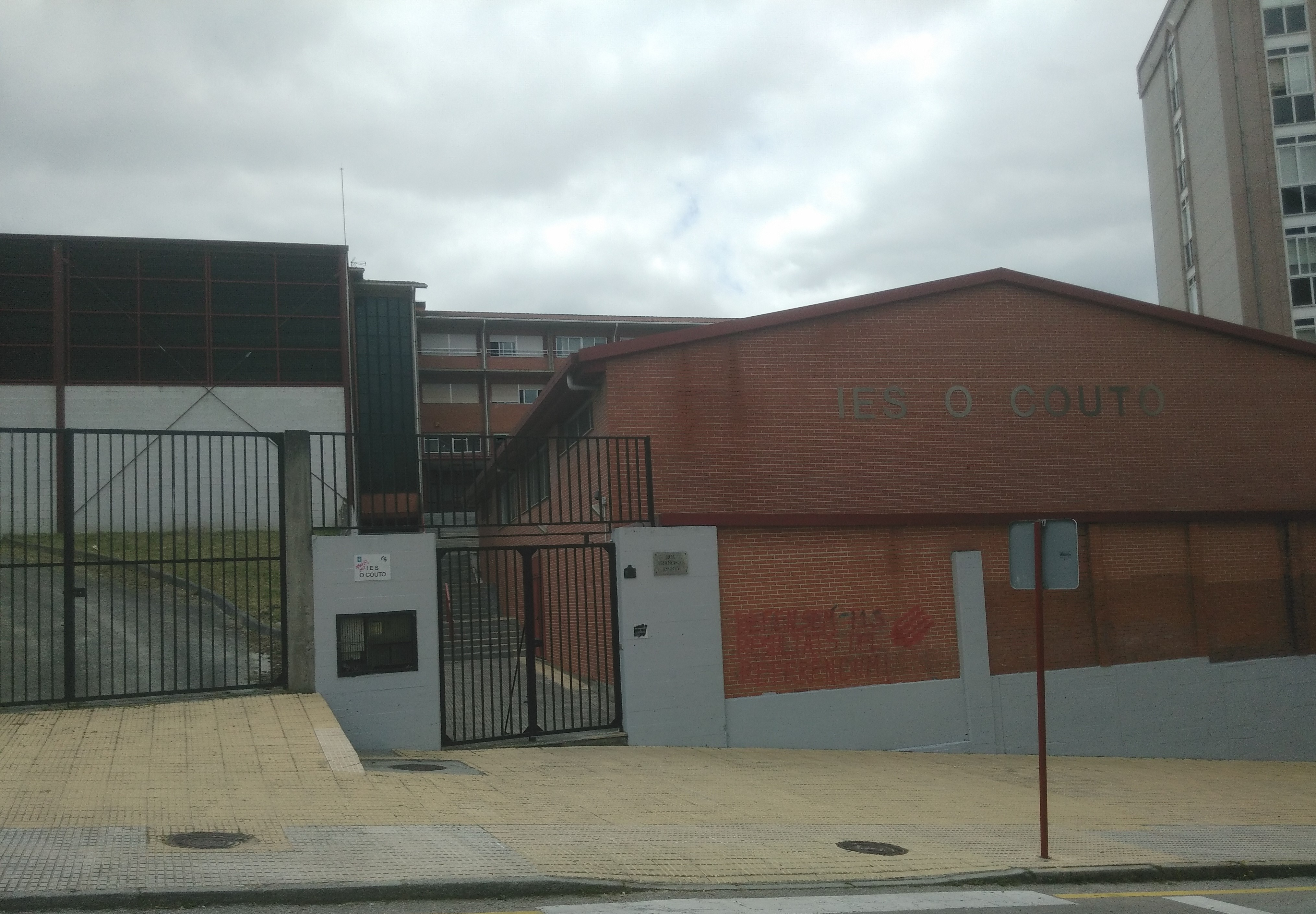 Instituto de Enseñanza Secundaria Obligatorio y Bachillerato, IES "O Couto".